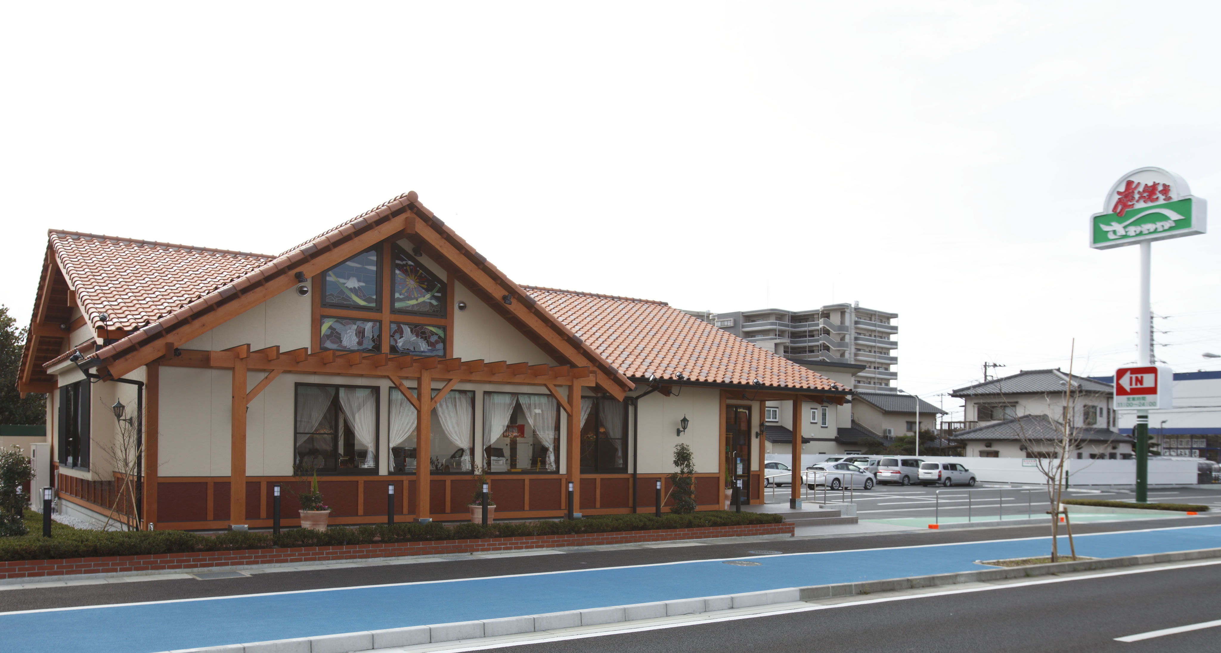 「炭焼きさわやか」のサインが目印